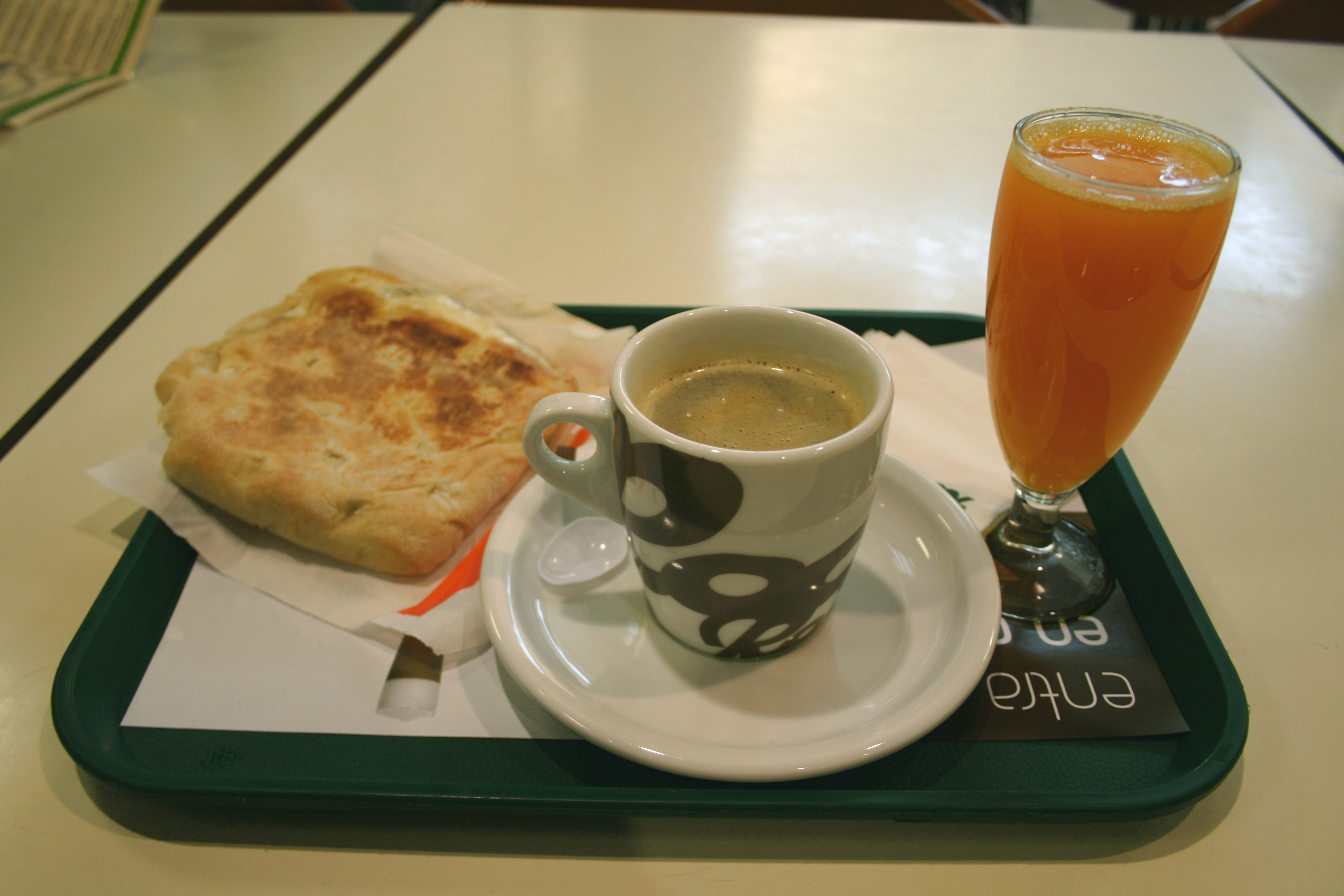 Desayuno con su sandwich de pastrami y queso, café y zumo de naranja